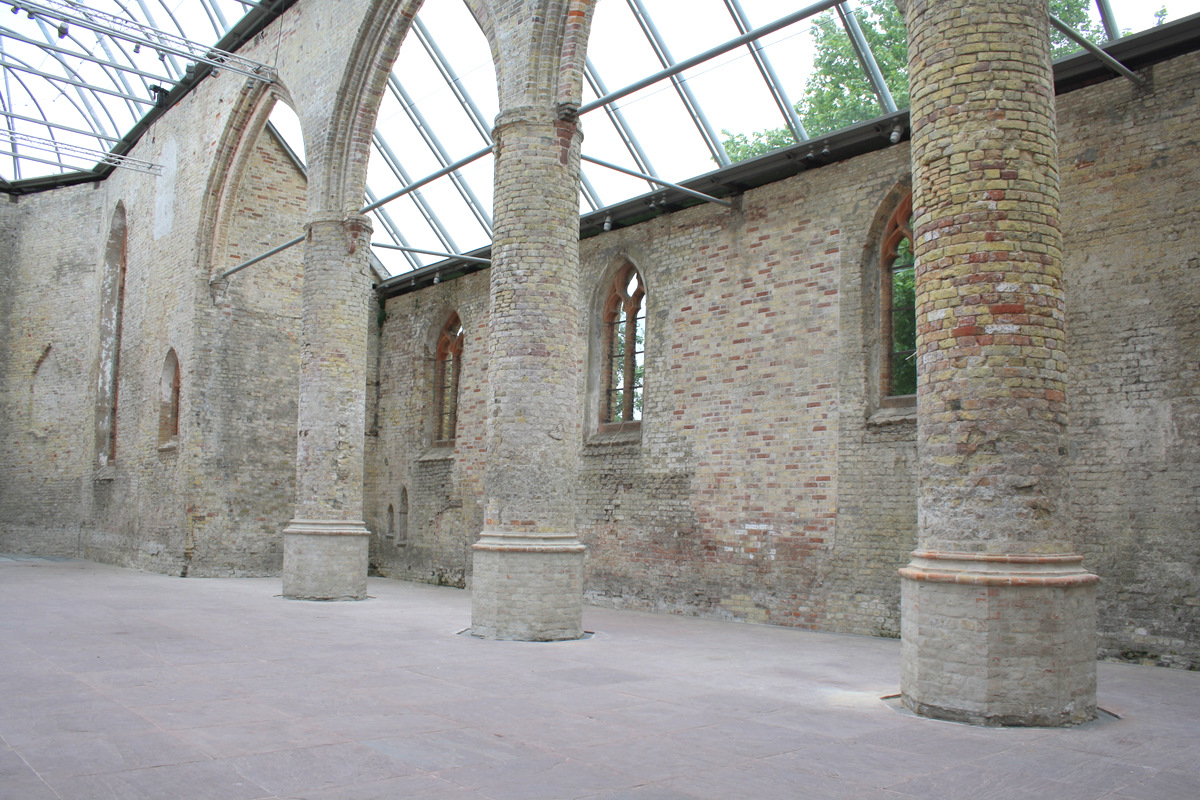 Binnenzijde Broerekerk